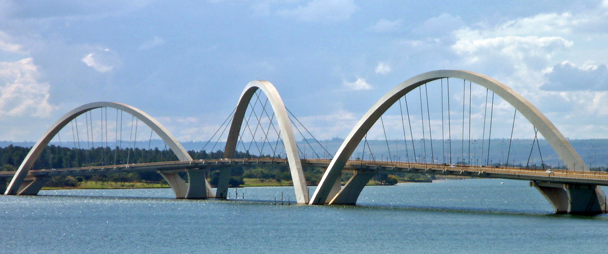 Bridge Juscelino Kubitschek (Ponte JK), Brasilia, D.F. Brazil, 2007